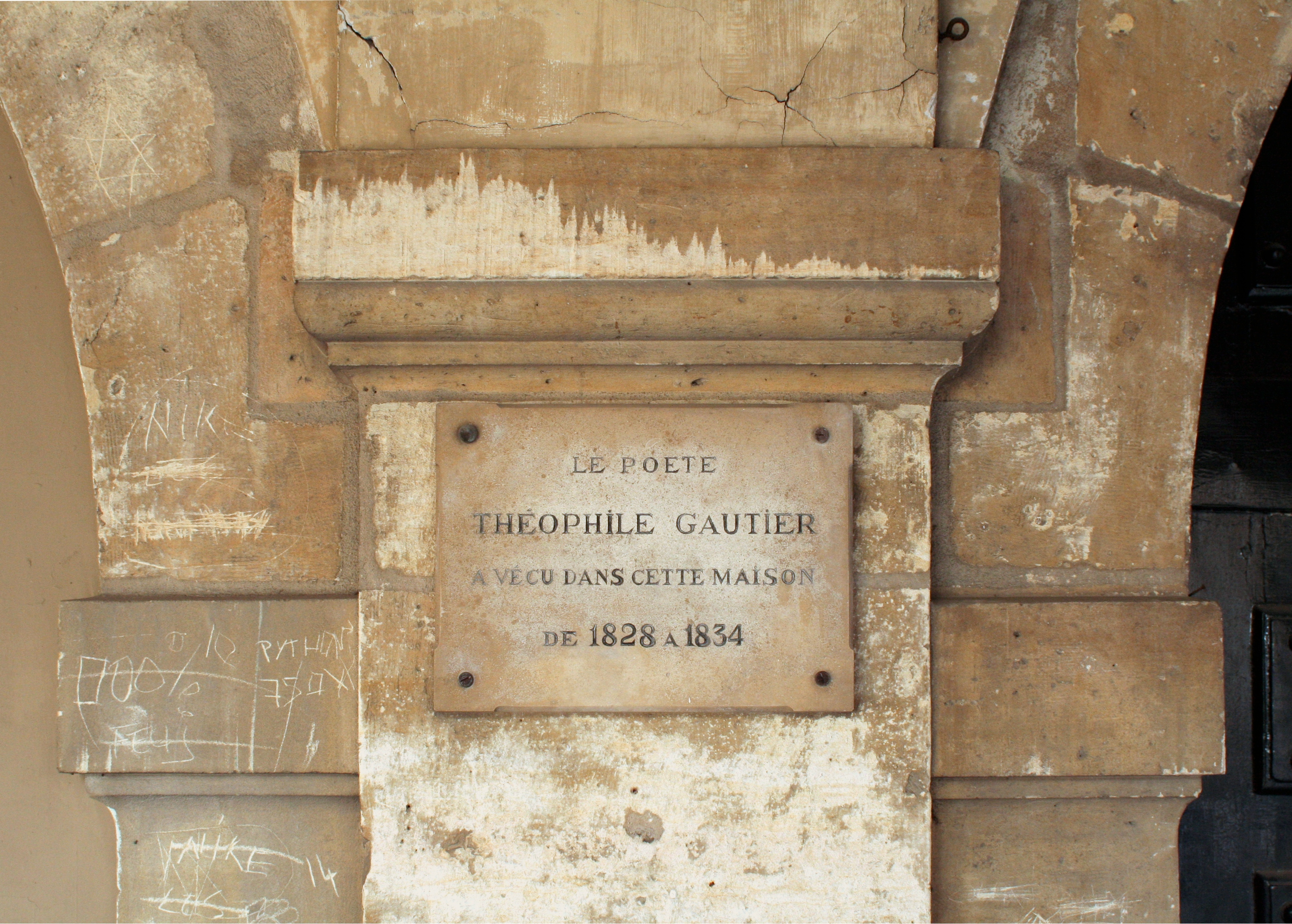 Plaque à côté de la porte du 8, place des Vosges : « Le poète Théophile Gautier a vécu dans cette maison de 1828 à 1834 »